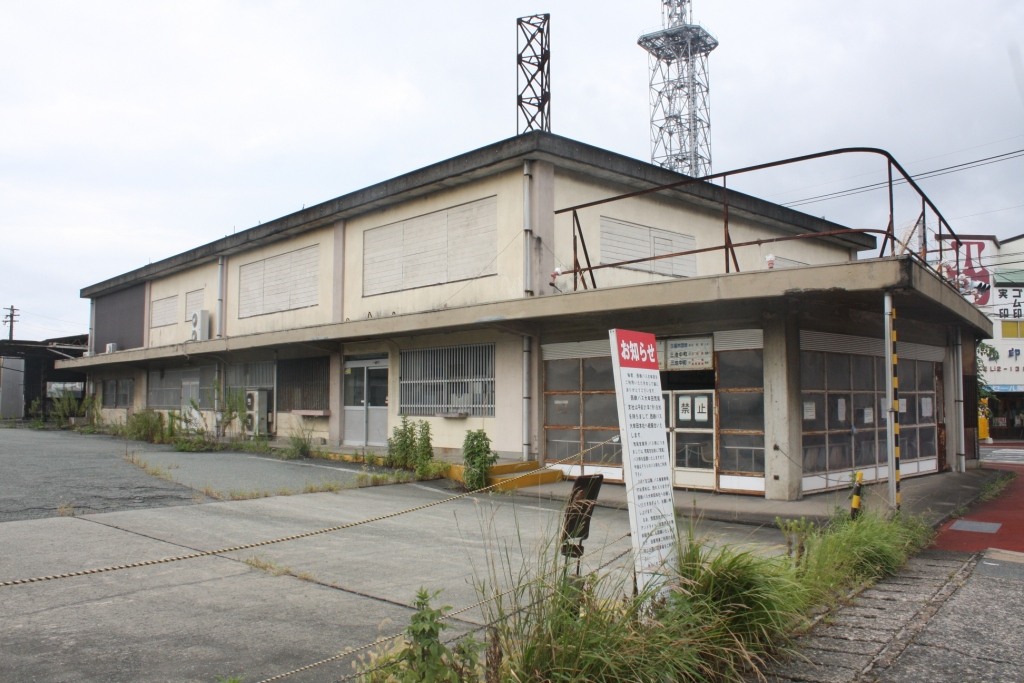 西鉄バス大牟田荒尾支社